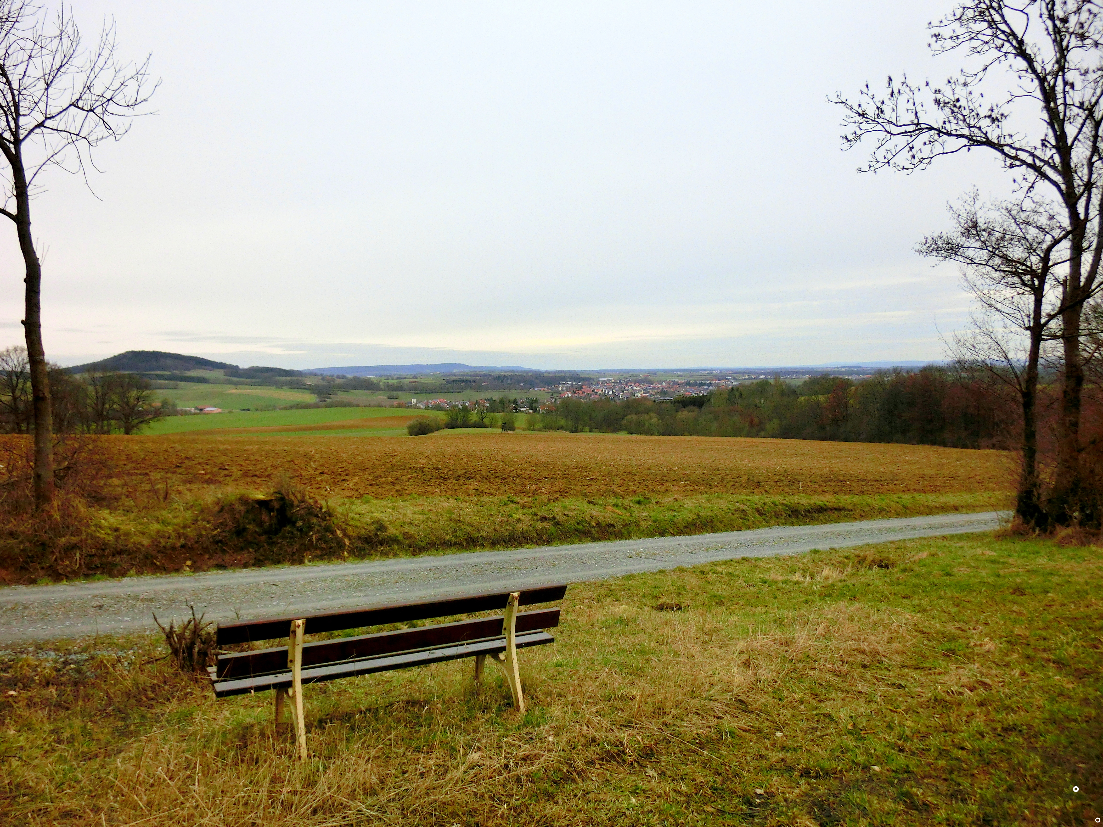 Hummelgau